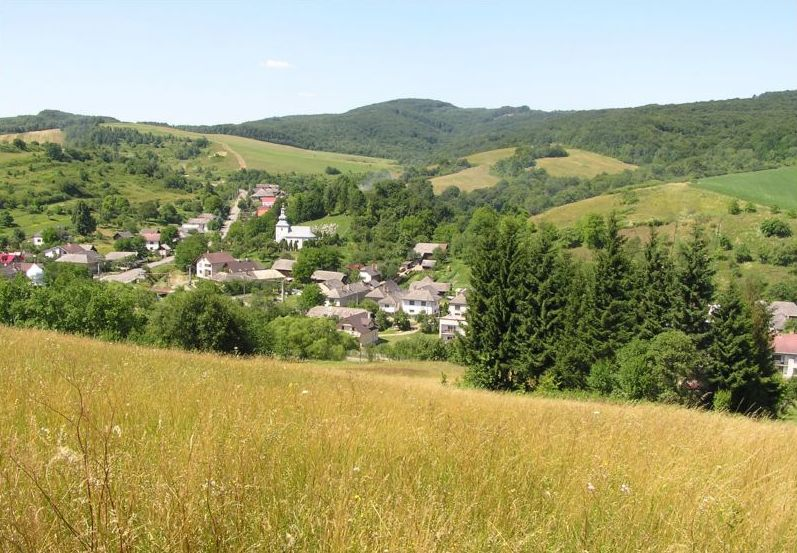 DescriptionCelkový pohľadDate25 June 2006SourceOwn workAuthorAndrej BelovežčíkPermission (Reusing this file) anoCelkový pohľad